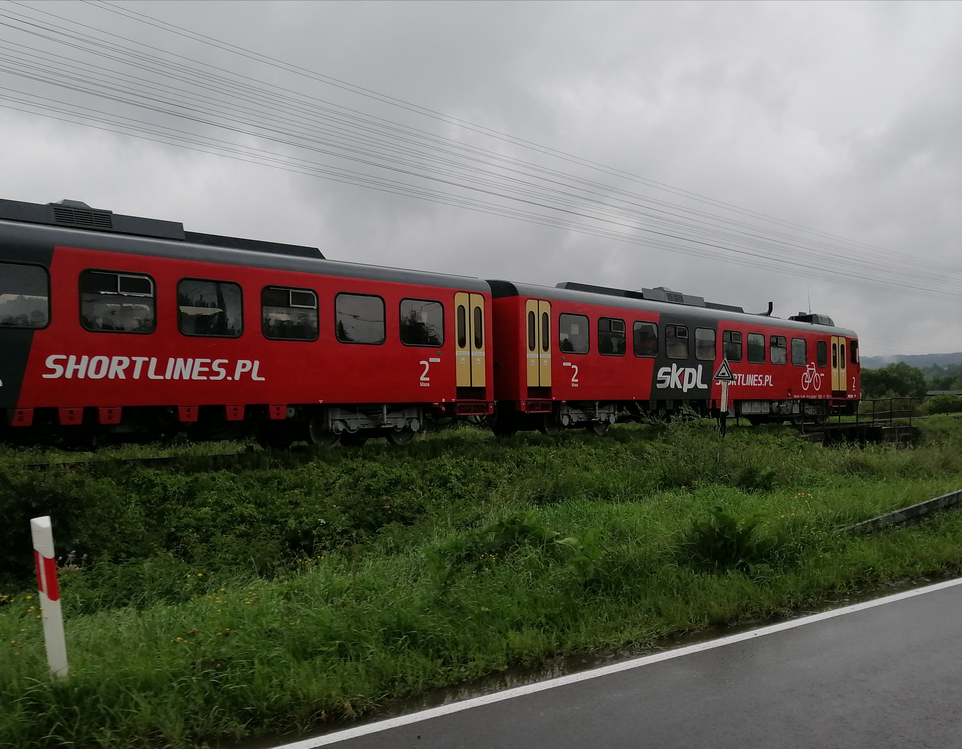 Skład zespolony przewoźnika SKPL (Stowarzyszenie Kolejowych Przewoźników Lokalnych SHORTLINES.PL) relacji Łupków - Zagórz na linii kolejowej nr 107